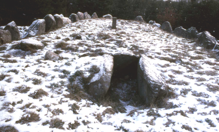 Pipstorn